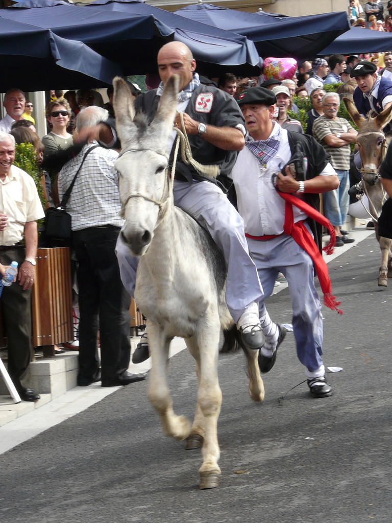 Gasteizko blusen asto-lasterketa